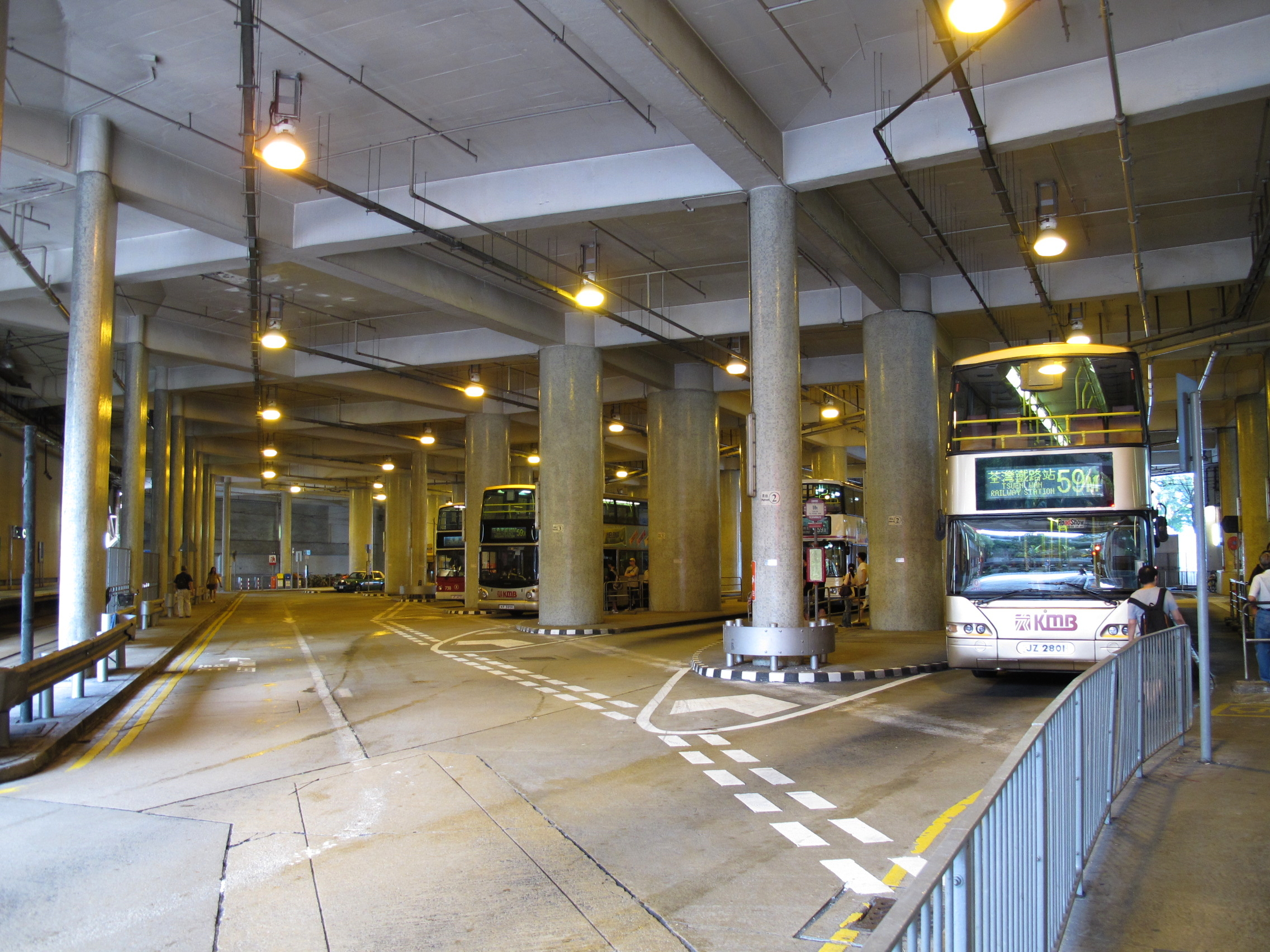 Tuen Mun Pier Head Bus Terminus 屯門碼頭公共運輸交匯處